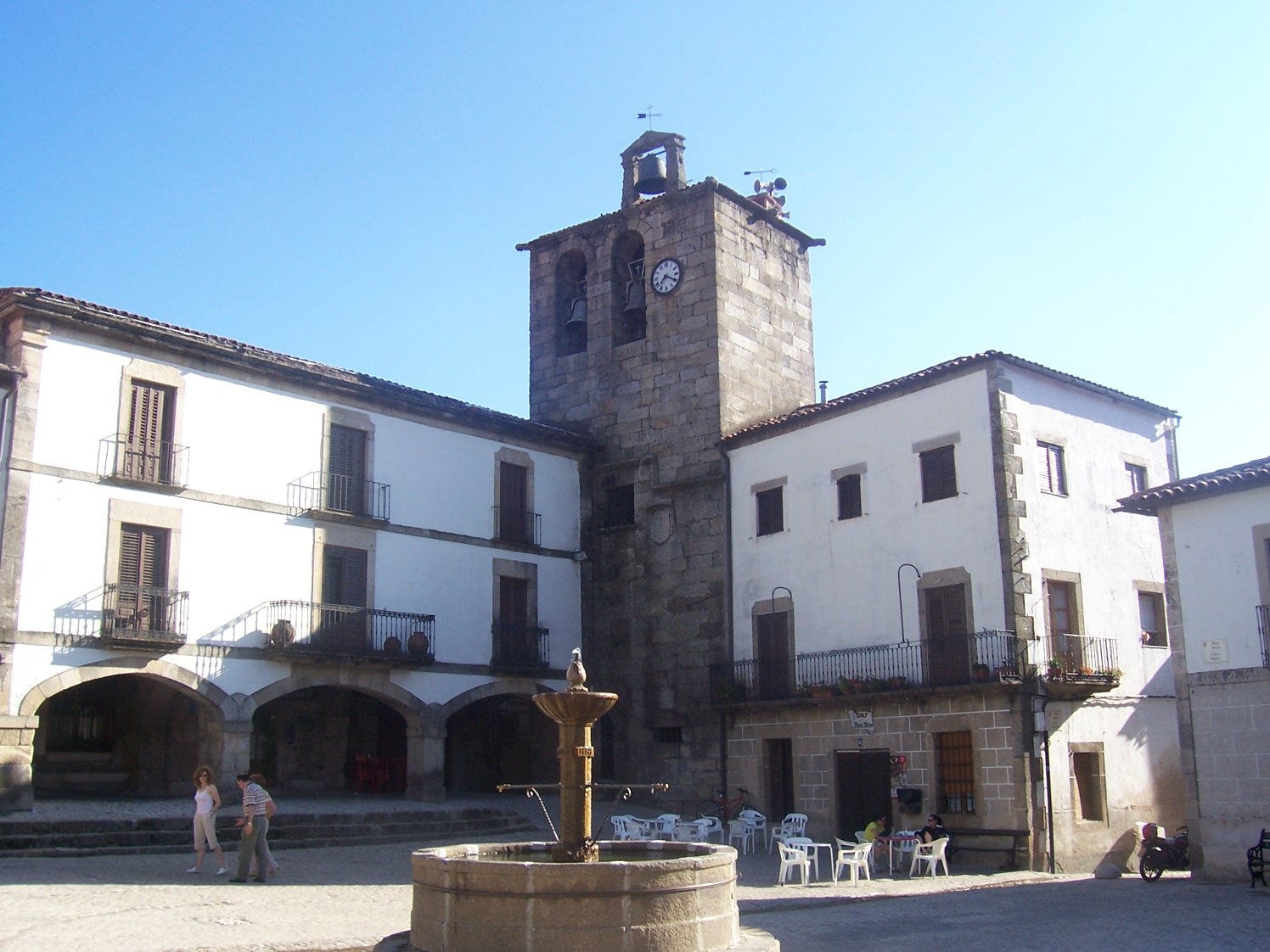 Plaza Mayor de San Martín de Trevejo, provincia de Cáceres, España.